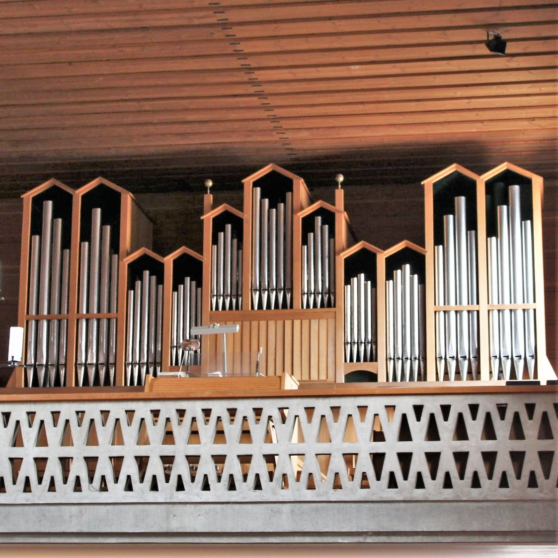 Orgel der Dankeskirche in München (1979, W. Stöberl, II/23)